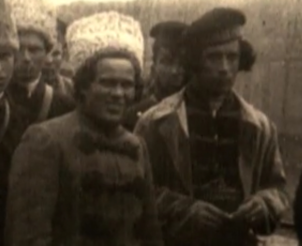 Nestor Makhno au centre avec Fedir Shchus à droite, 1919.